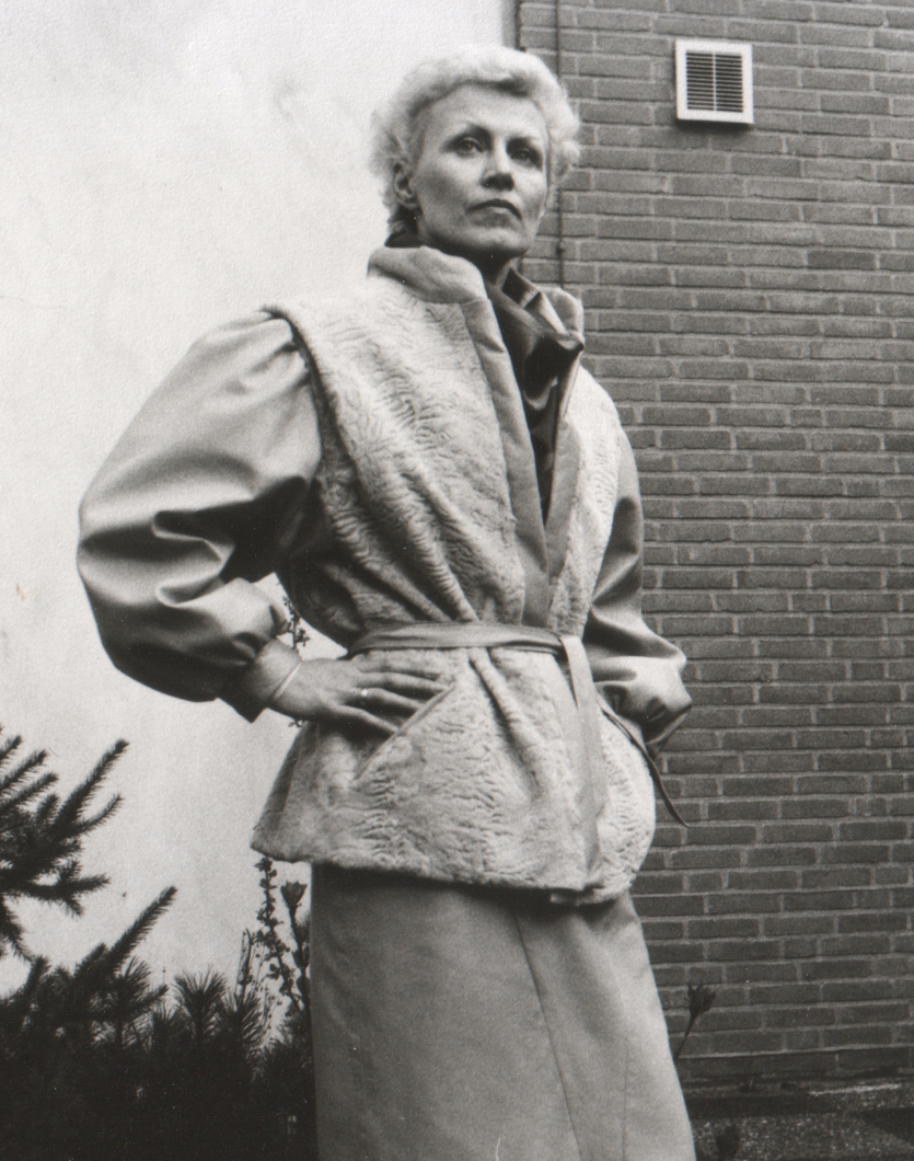 Pelzatelier Schöller, Gütersloh, Spiekergasse. Indisch Lammjacke.